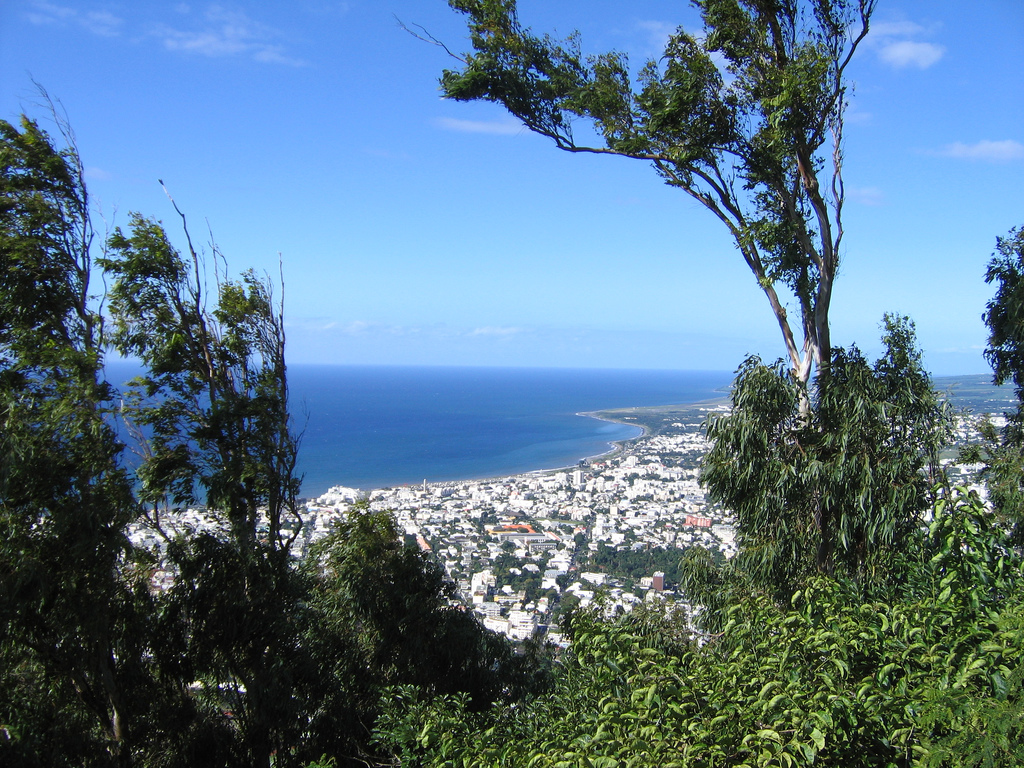 Saint-Denis @ La Réunion